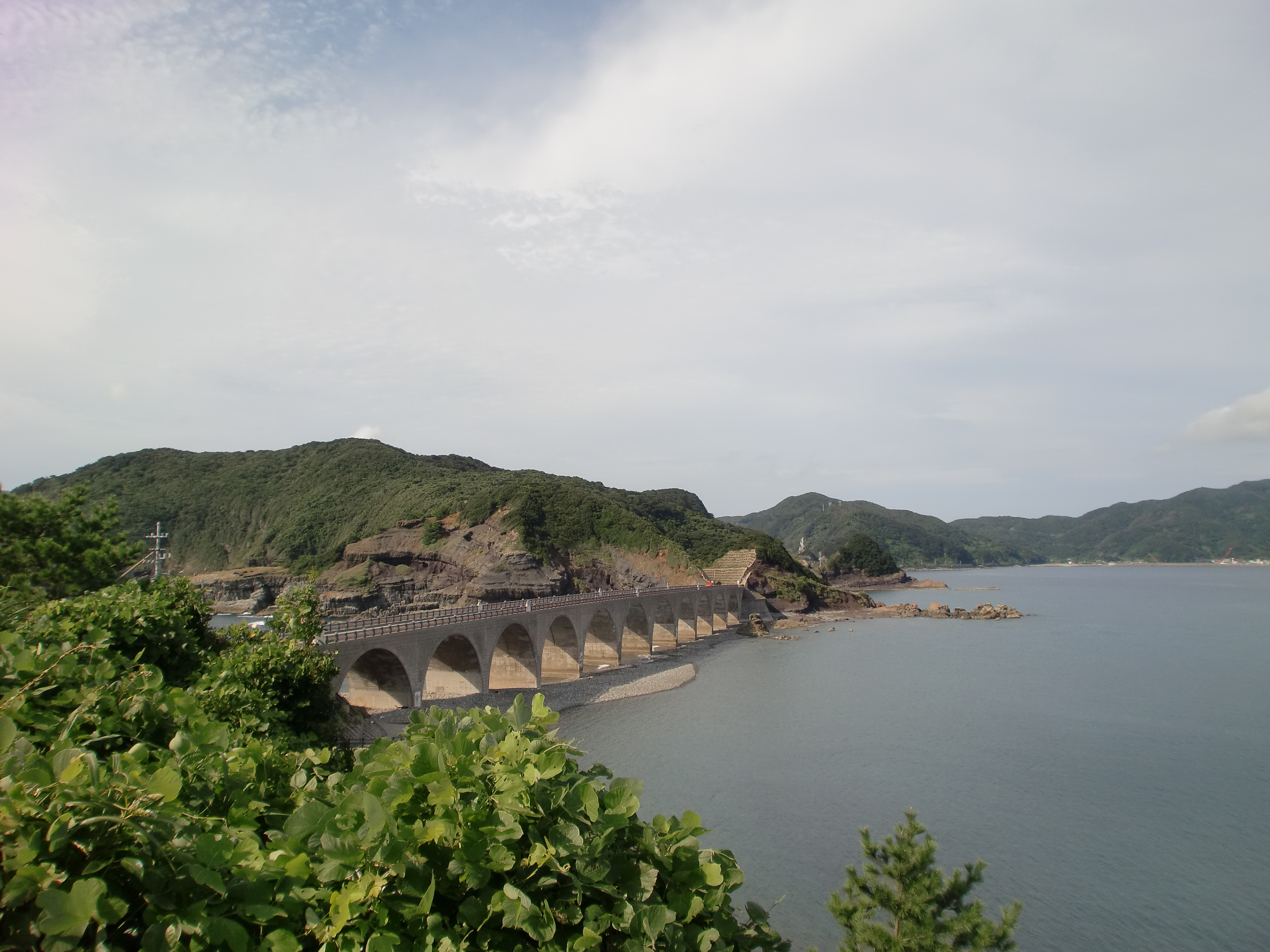 鹿の子大橋を付近の展望ポイントから見渡す。